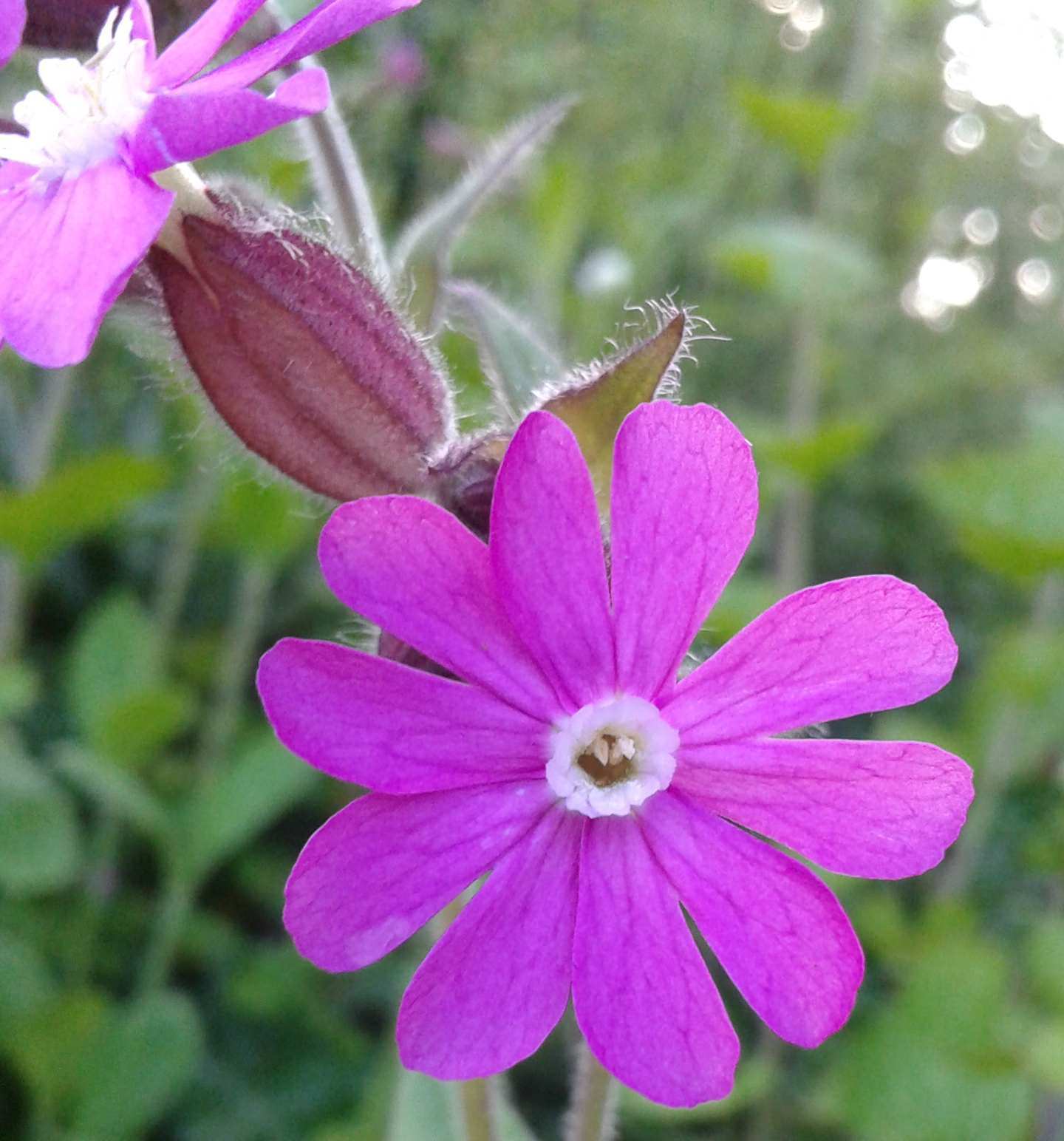 Compagnon rouge, Silene dioica photo pris en nord pas de calais